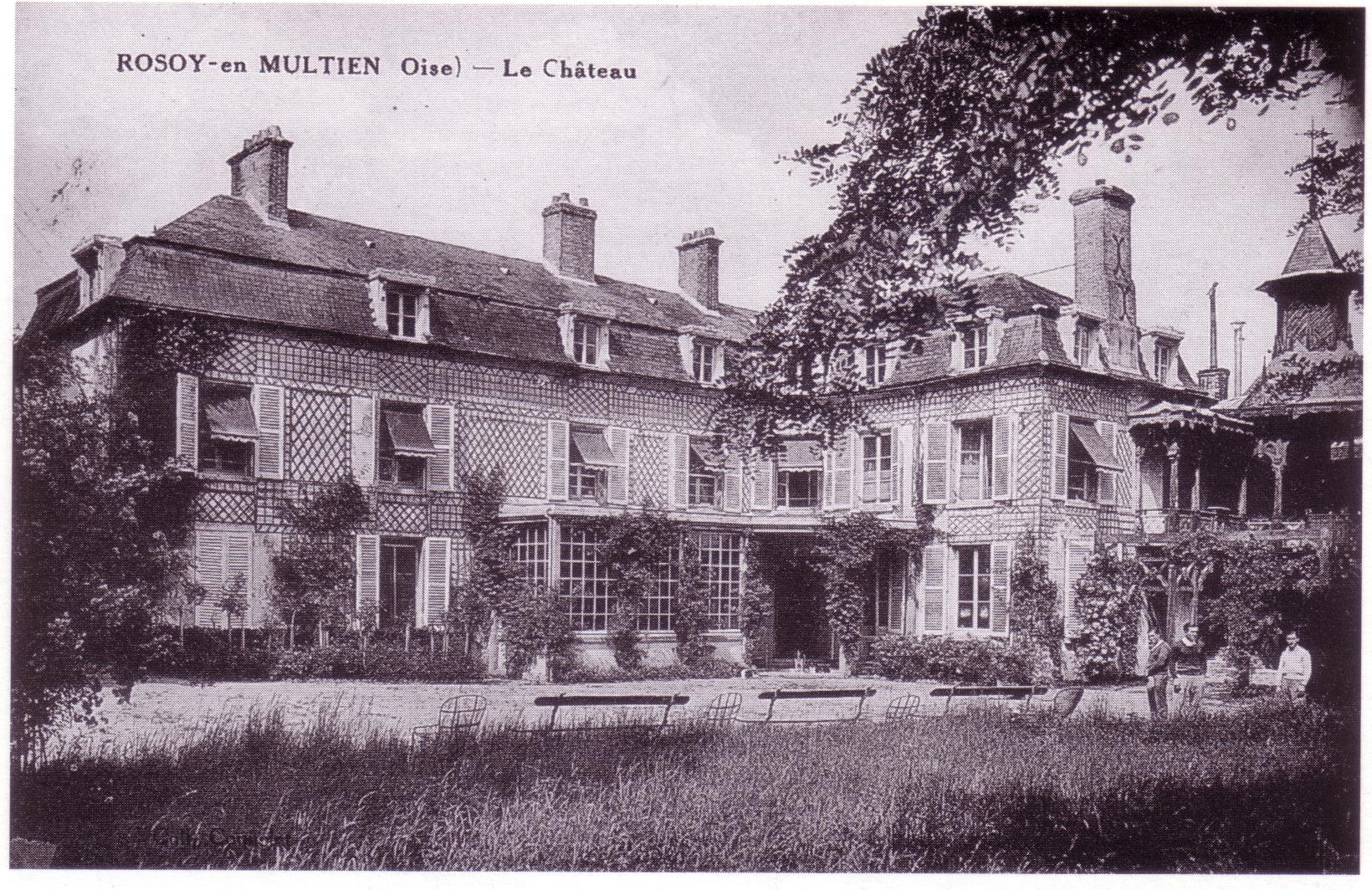 Au n°12 Grande Rue, XVIIIe siècle (1778)